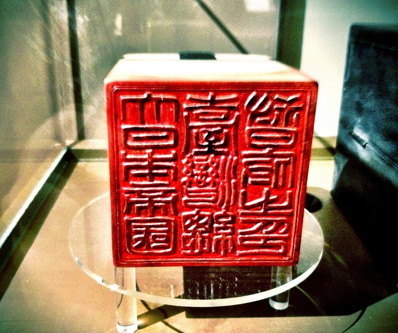 藏於臺灣總統府